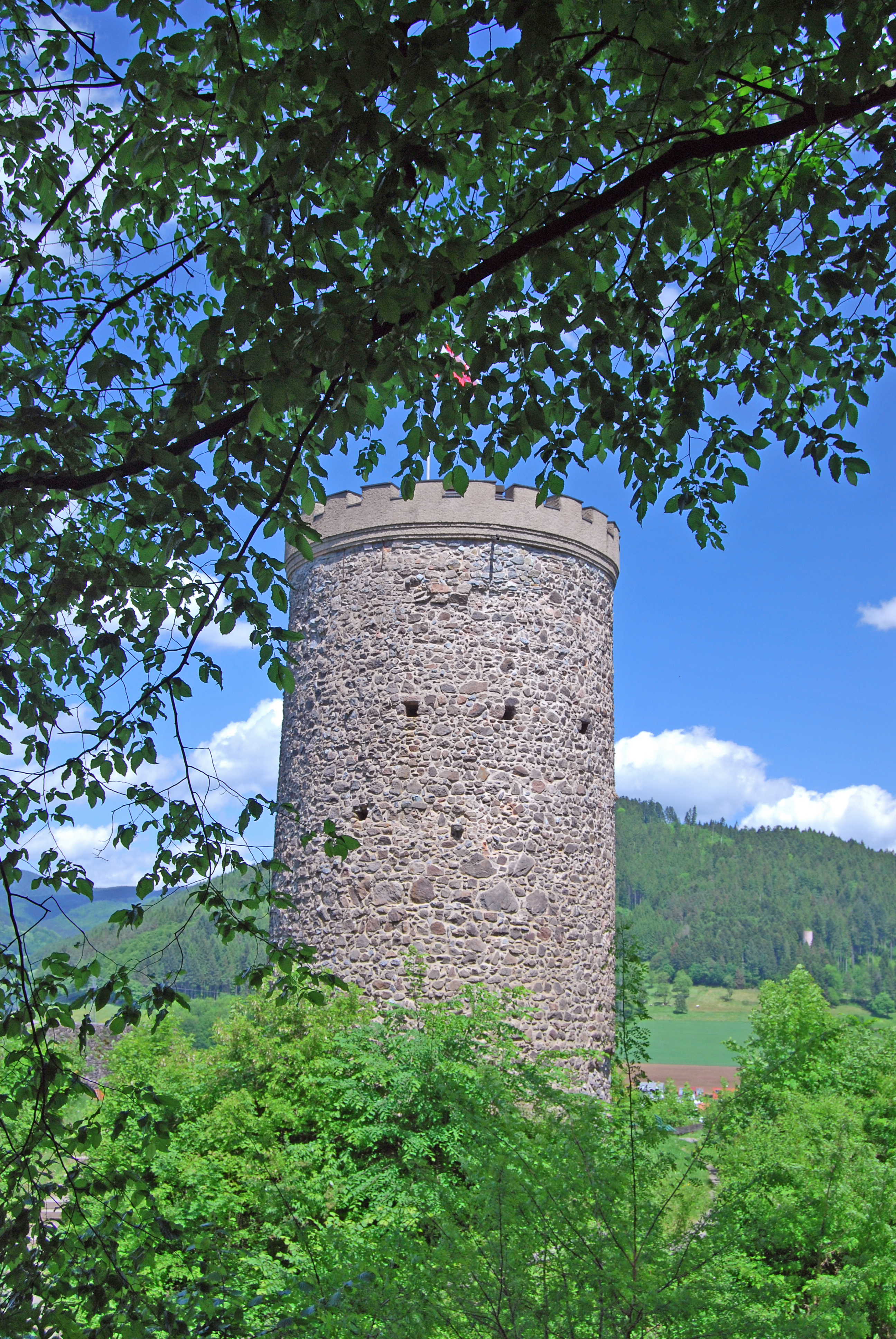 Burg Hausach